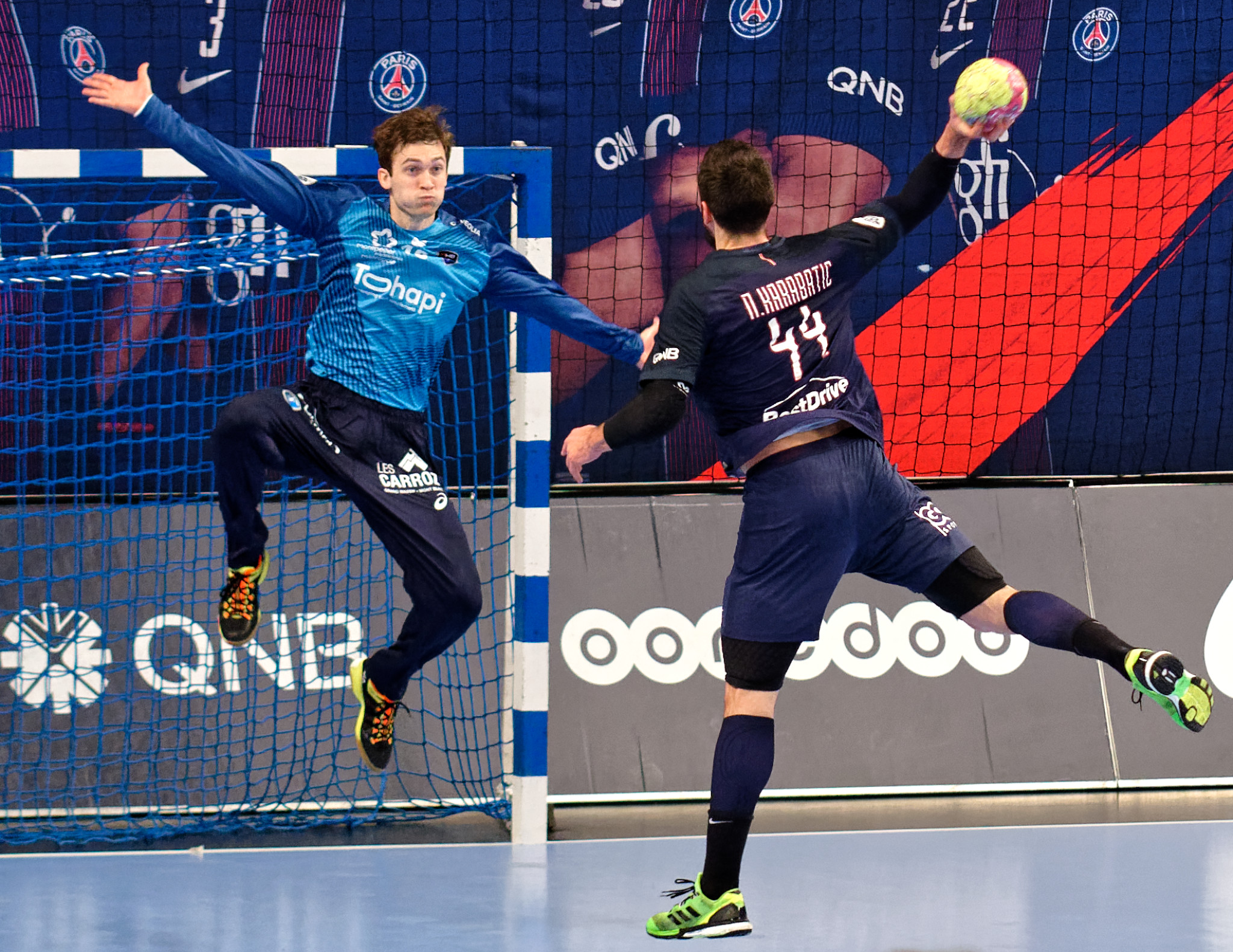 Rencontre de 8e de finale de la Coupe de France de handball 2016-17 entre le PSG et Montpellier. A Coubertin, le 22 février 2017.